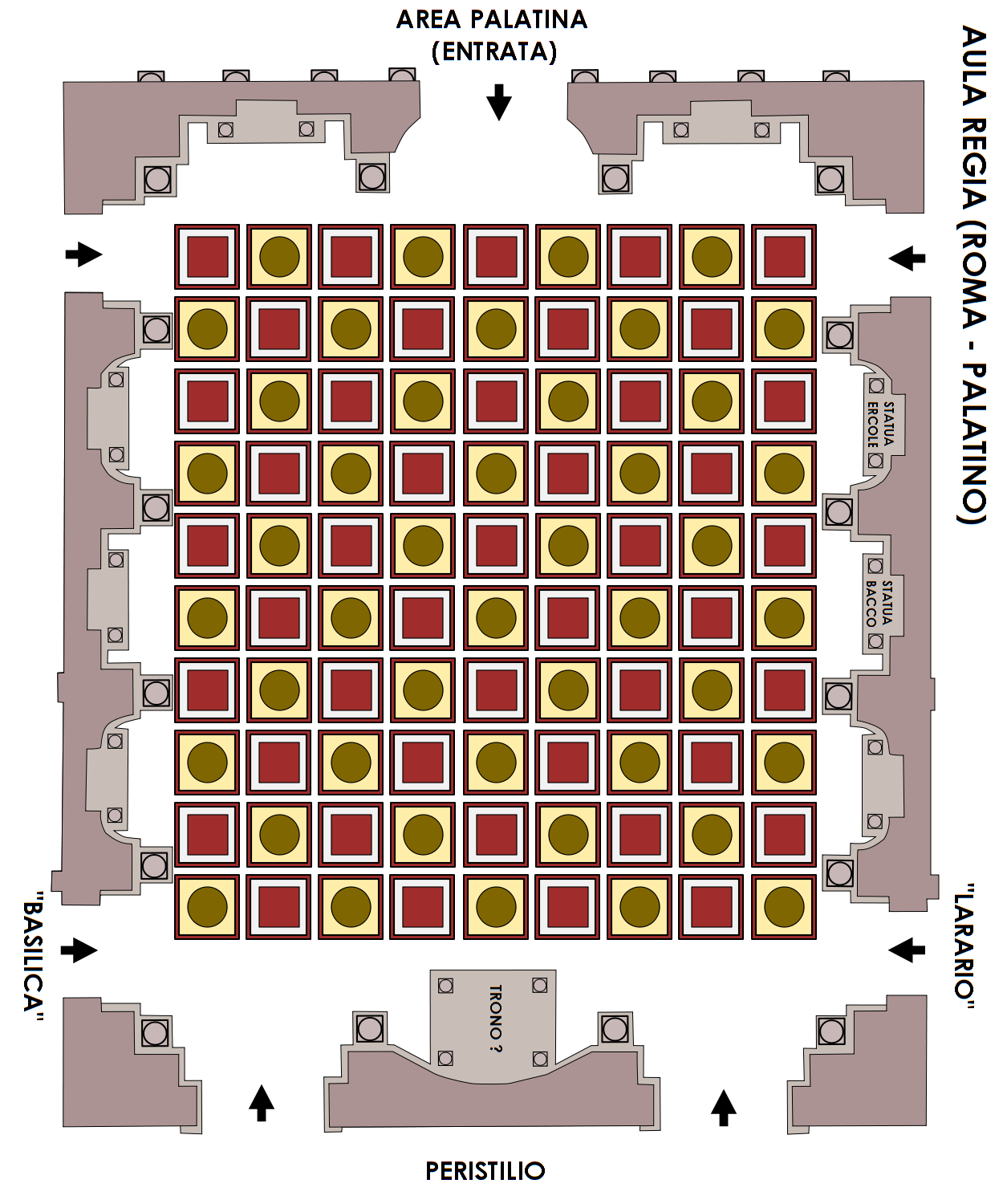 Pianta dell'aula Regia della Domus Augustiana di Domiziano (Roma - Palatino; 81-92 AD); architetto Rabirio.